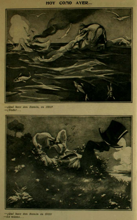 Caricatura en la revista Pacífico Magazine describiendo al presidente en ejercicio, comparando su actuación en la Guerra Civil durante el hundimiento del Blanco Encalada y su forma de gobernar